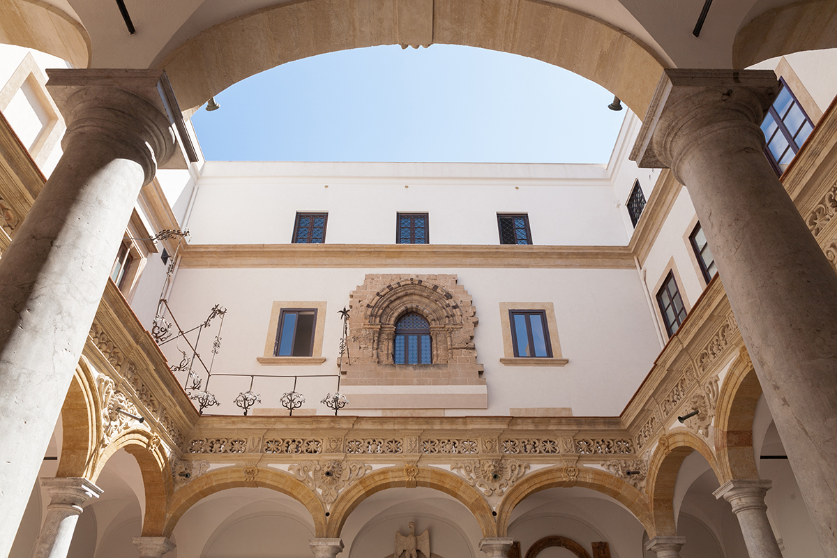 Primo piano del Museo Salinas visto dal chiostro minore